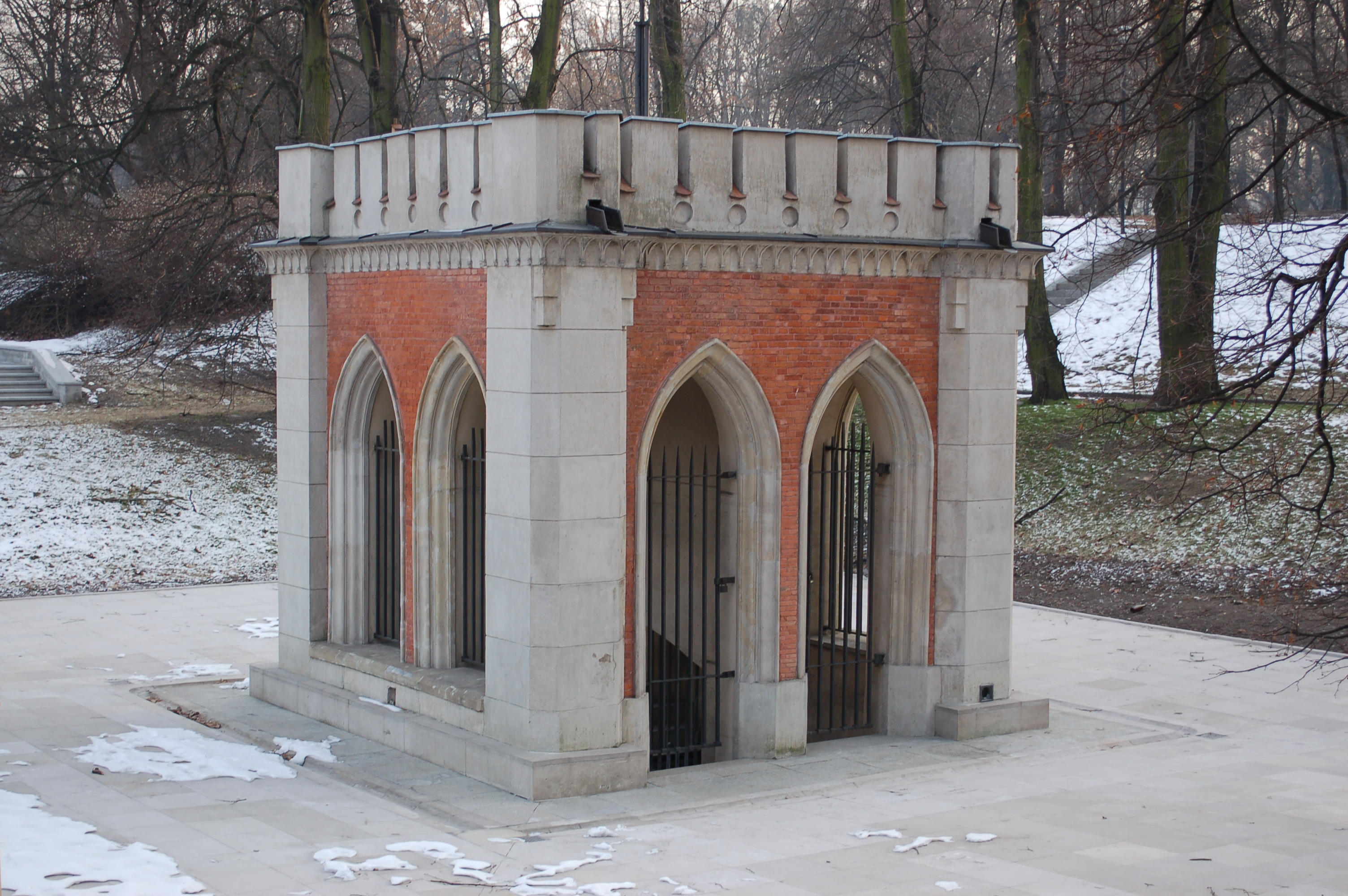 Royal Spring 1771 Warsaw